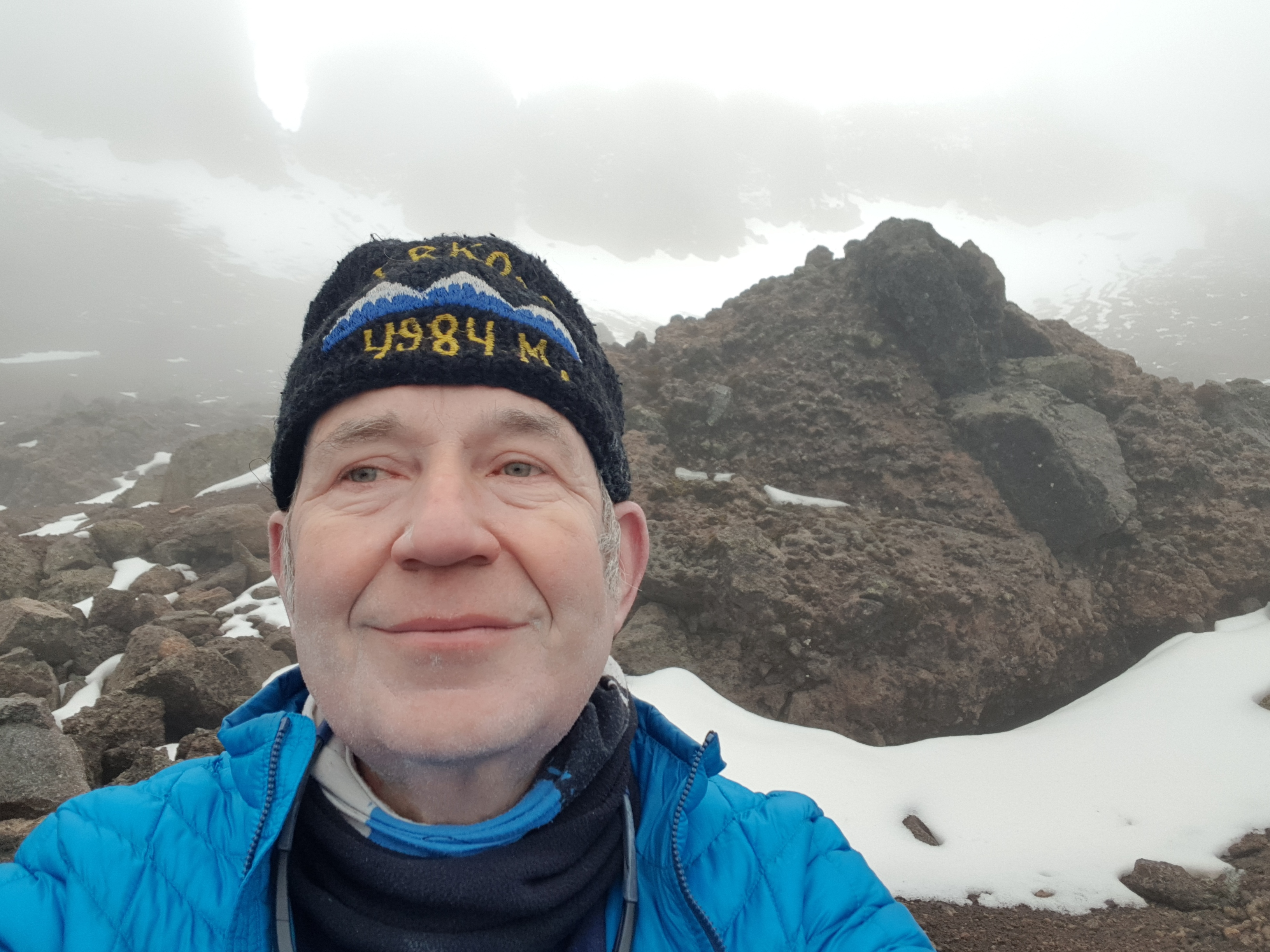 Matkal Etioopias